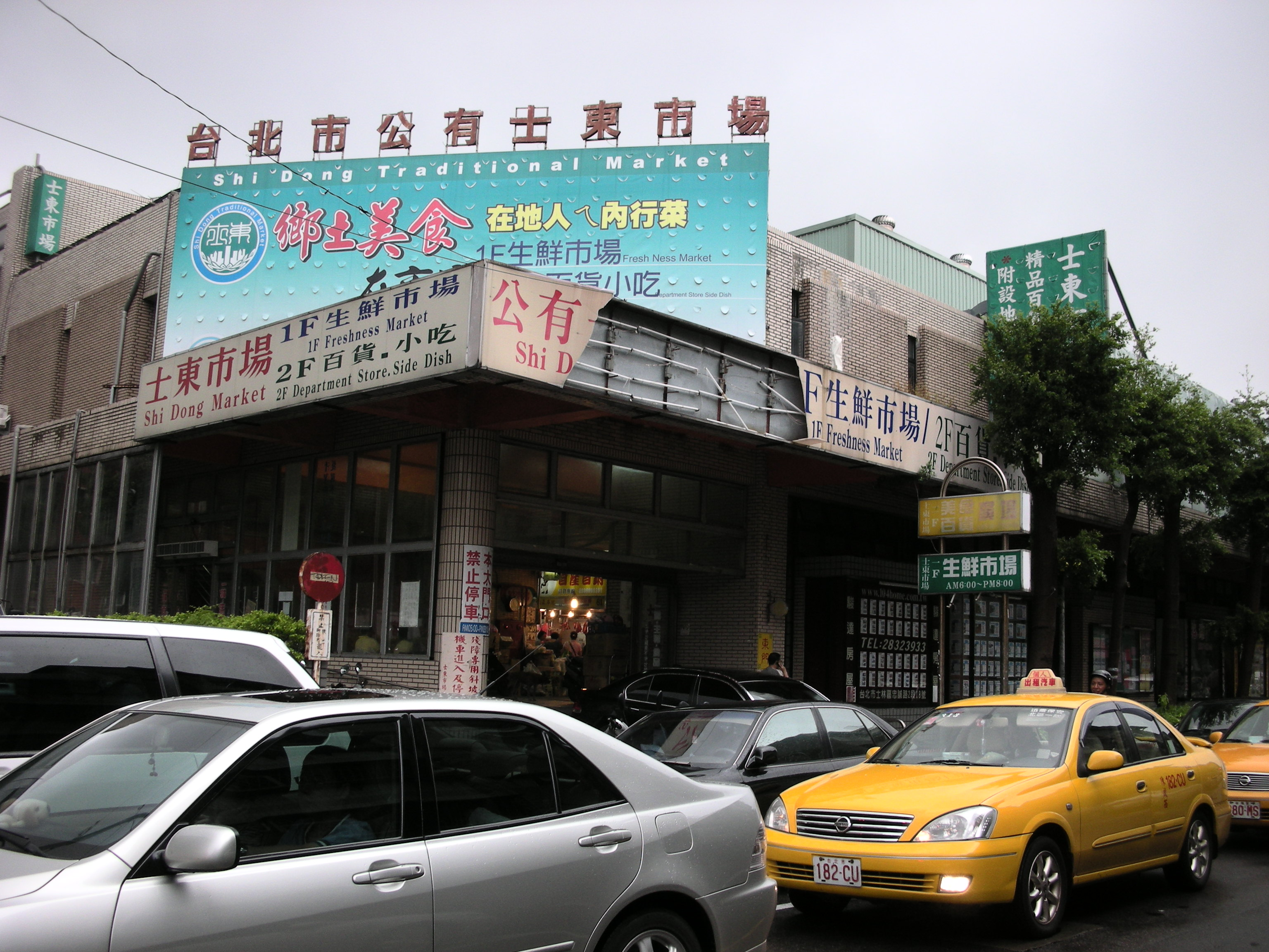 士林區士東市場